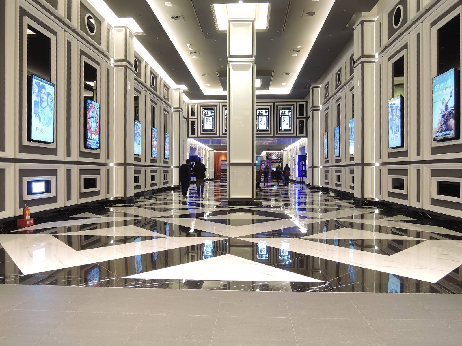 中文（台灣）: 國賓影城@八德廣豐新天地，地址：桃園市八德區介壽路一段728號3樓（廣豐新天地）。